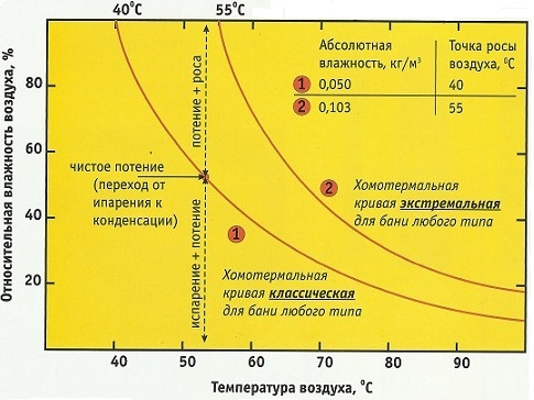 Хошев ХТ